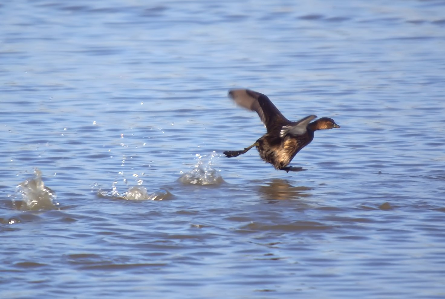 Zampullín a la carrera - Cabusset a la carrera - Little Grebe running on water - Tachybaptus ruficollis, Viladecans, Barcelona, Spain